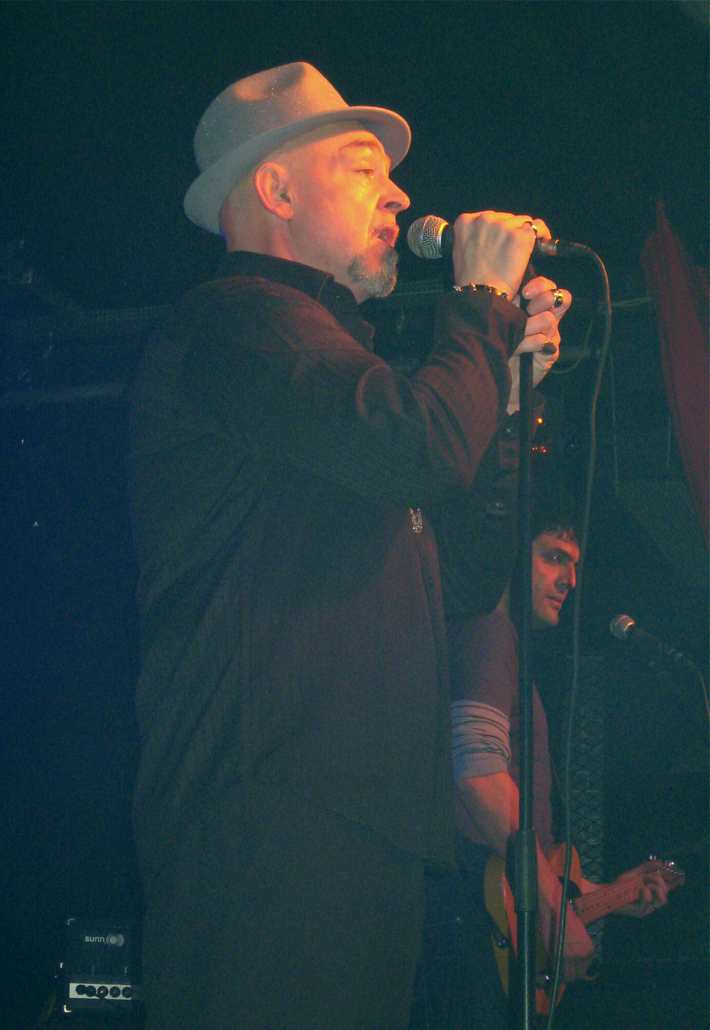 Sänger Gerd Knebel und Gitarrist Aren Emirze von "Angst vor Clowns" live im Colos-Saal Aschaffenburg